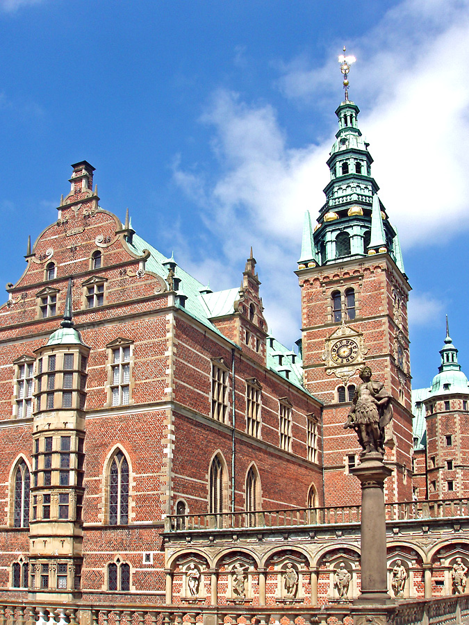 Kirkefløjen fra 1606 på Frederiksborg Slot, Hillerød, Denmark. photo by: Nico-dk/Nils Jepsen